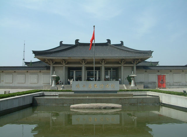 陕西历史博物馆 Jamguo 摄于2004年5月6日 版权所有（见下） 版权信息